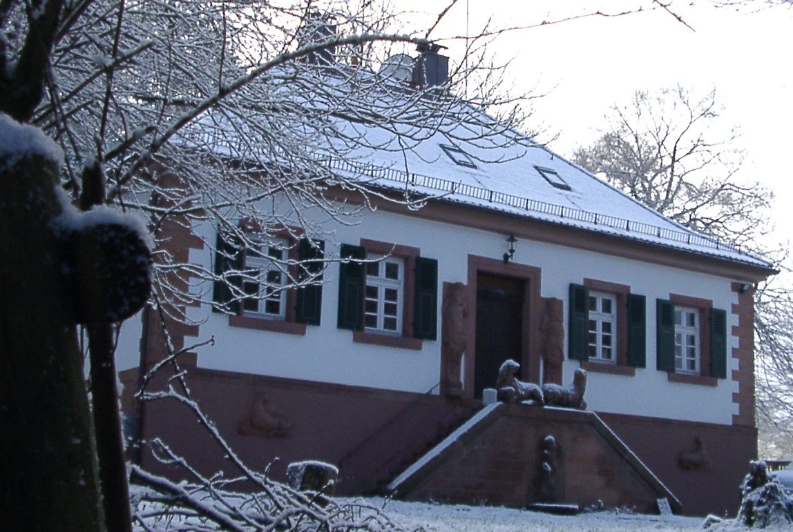 Jagdschloß Kehr-Dich-an-nichts bei Bad Dürkheim.